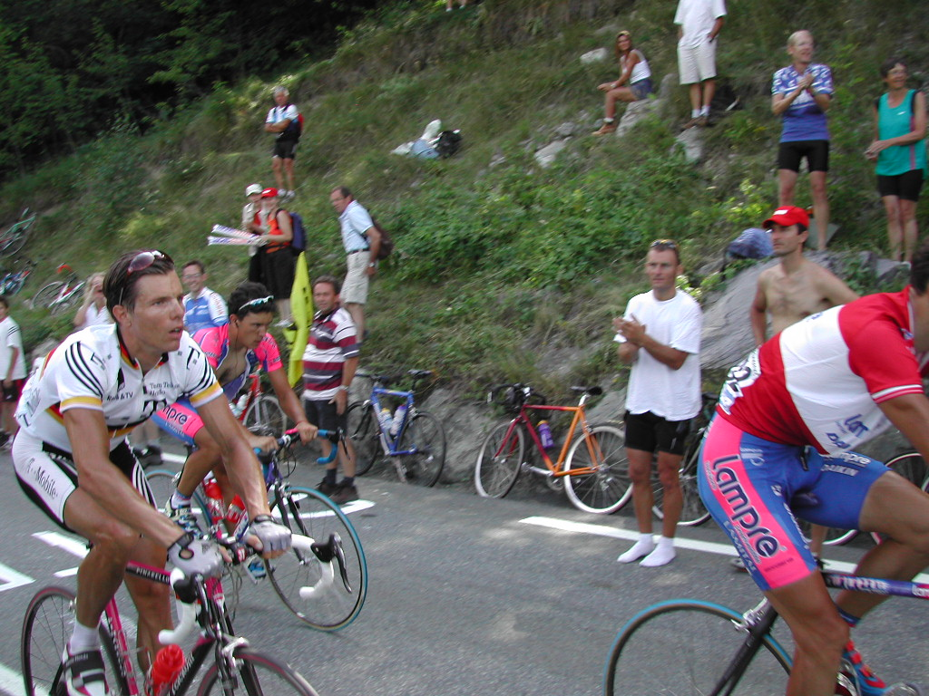 Danilo Hondo. Tour de France 2002, stage to Le Deux Alpes.